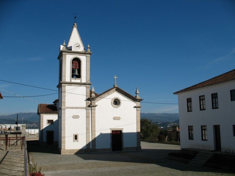 Amarante Fregim Igreja Matriz